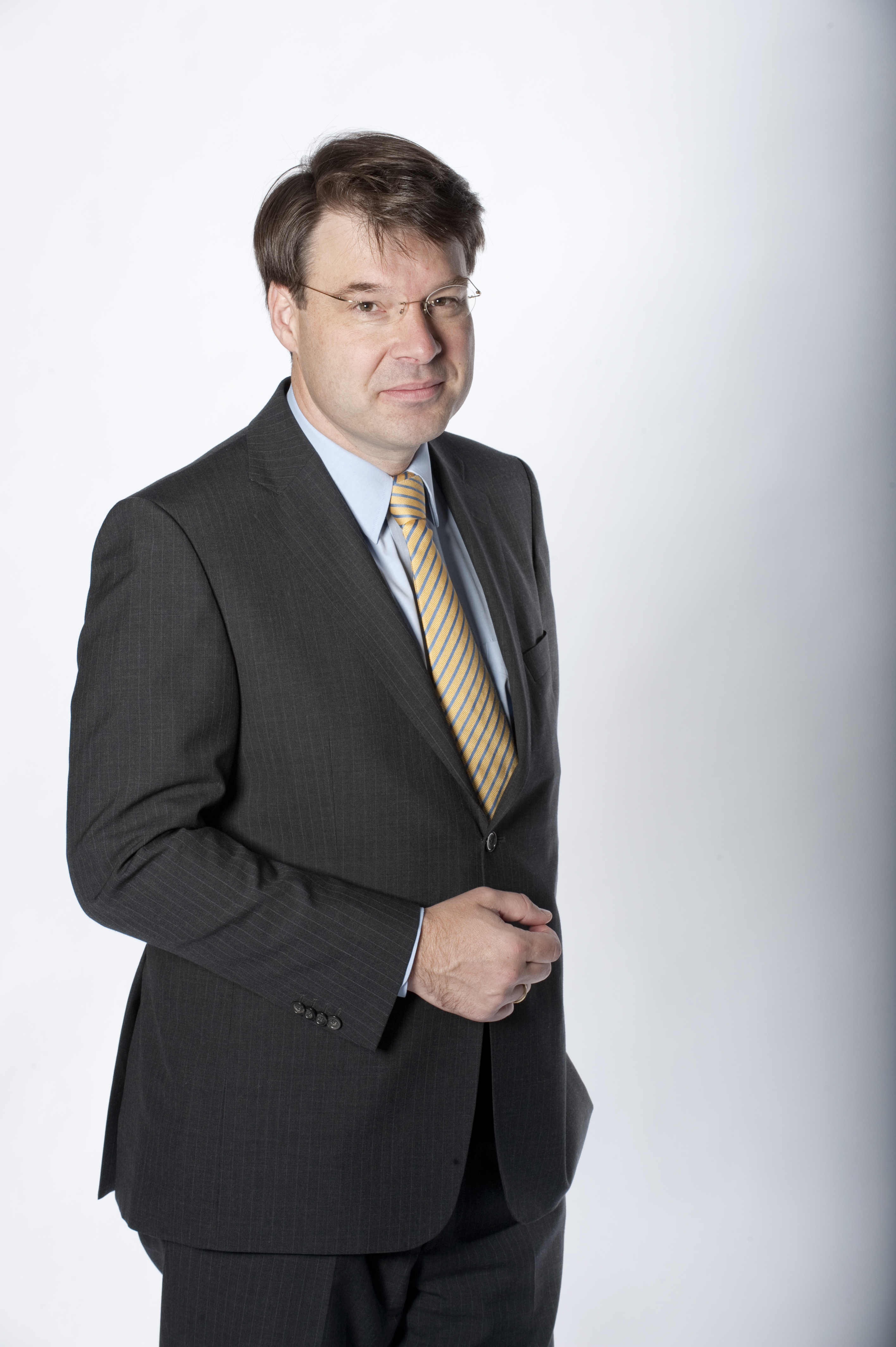 Roald van der Linde.